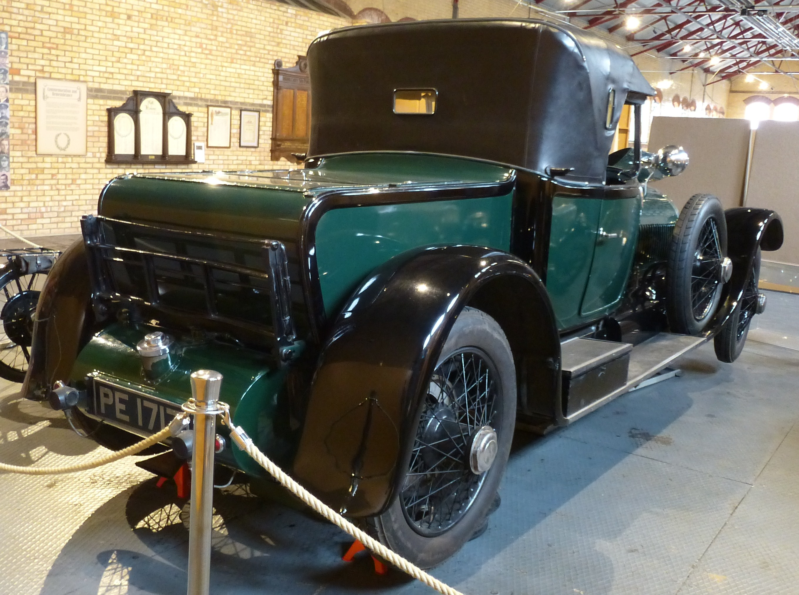 Sheffield-Simplex 50 HP 1920